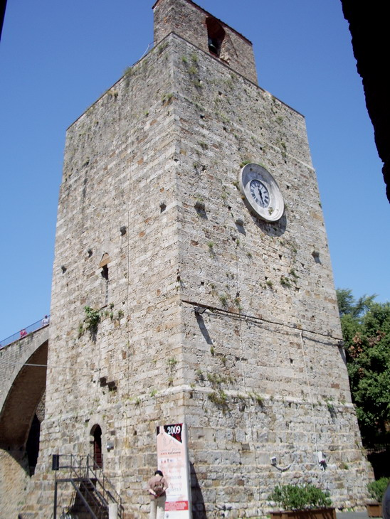 La Torre del Candeliere presso il Cassero Senese lungo le Mura di Massa Marittima